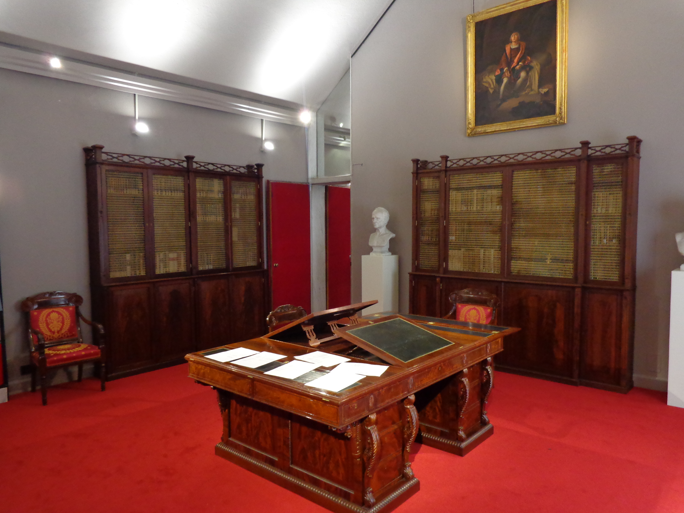 Palazzo Rosso, Genova: appartamenti della Duchessa